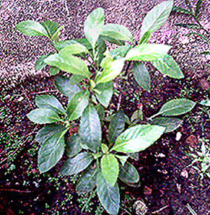 Photo Pokok Sambung Nyawa atau akar sebiak. Menggunakan kamera GrandVision EZshot E32 dengan resolusi 800x600 piksel pada 20 May 2005 di Ayer Keroh, Melak